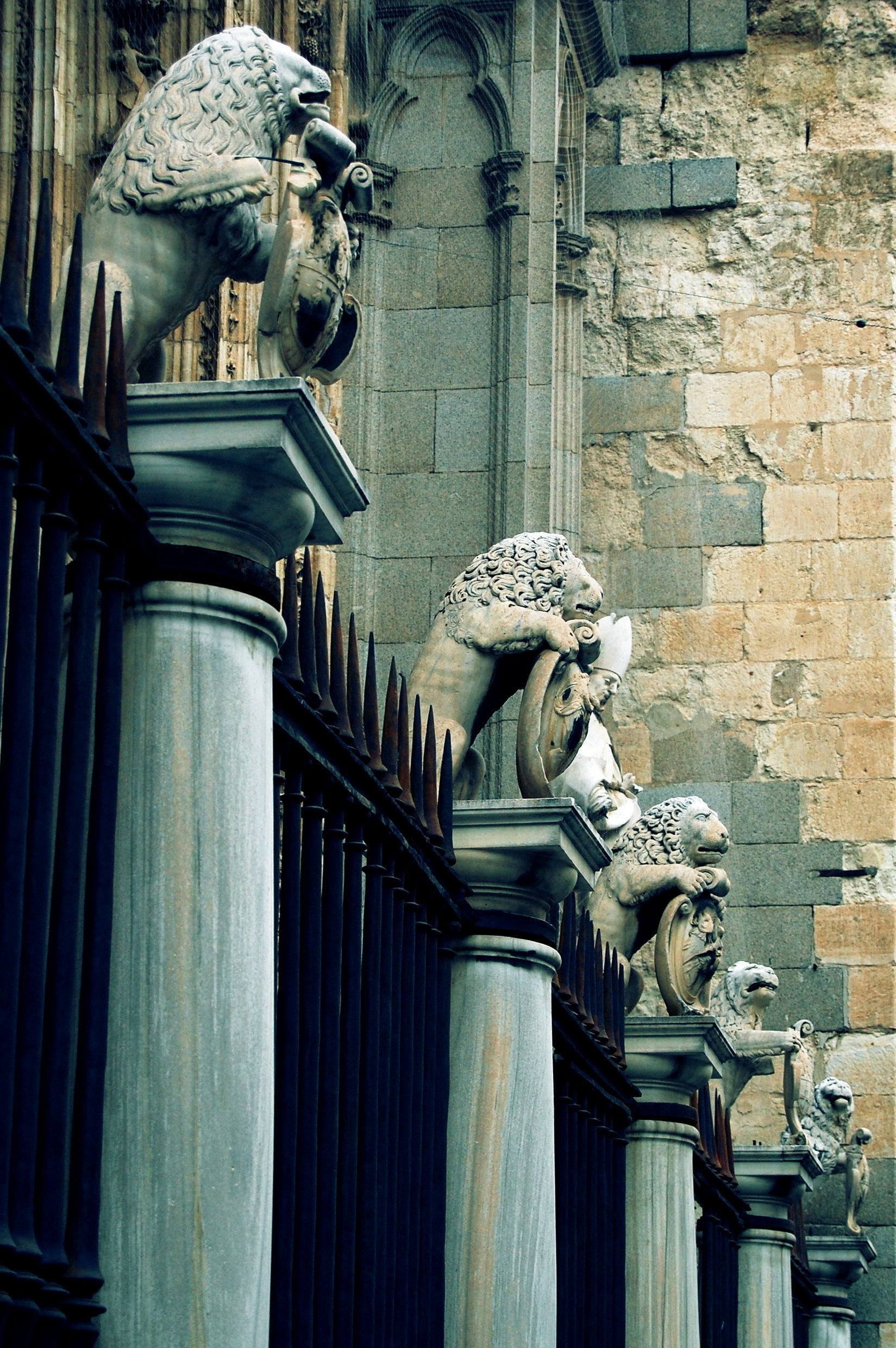 Como no podía ser de otra forma, detalle de la Puerta de los Leones de la Catedral de Toledo (Castilla-La Mancha, España).